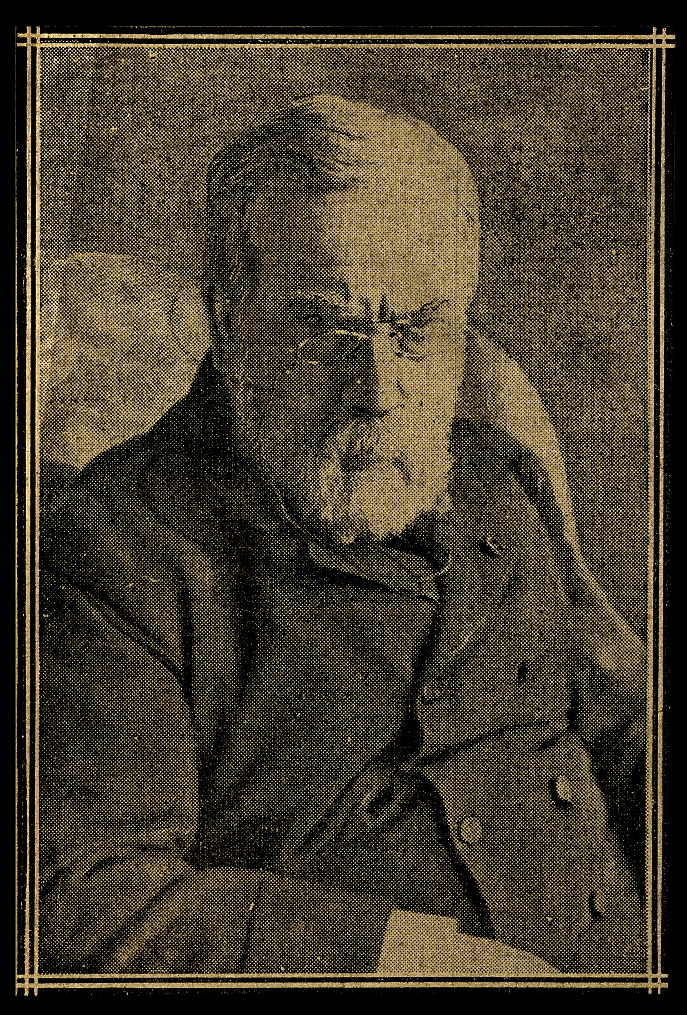 Lucien (Sacha) Guitry as Louis Pasteur Iconographic Collections Keywords: portrait prints; Louis Pasteur; Gerschell; Lucien Guitry; photogravures